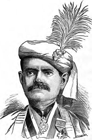 Raja Sir Sourindro Mohun Tagore (1840–1914)